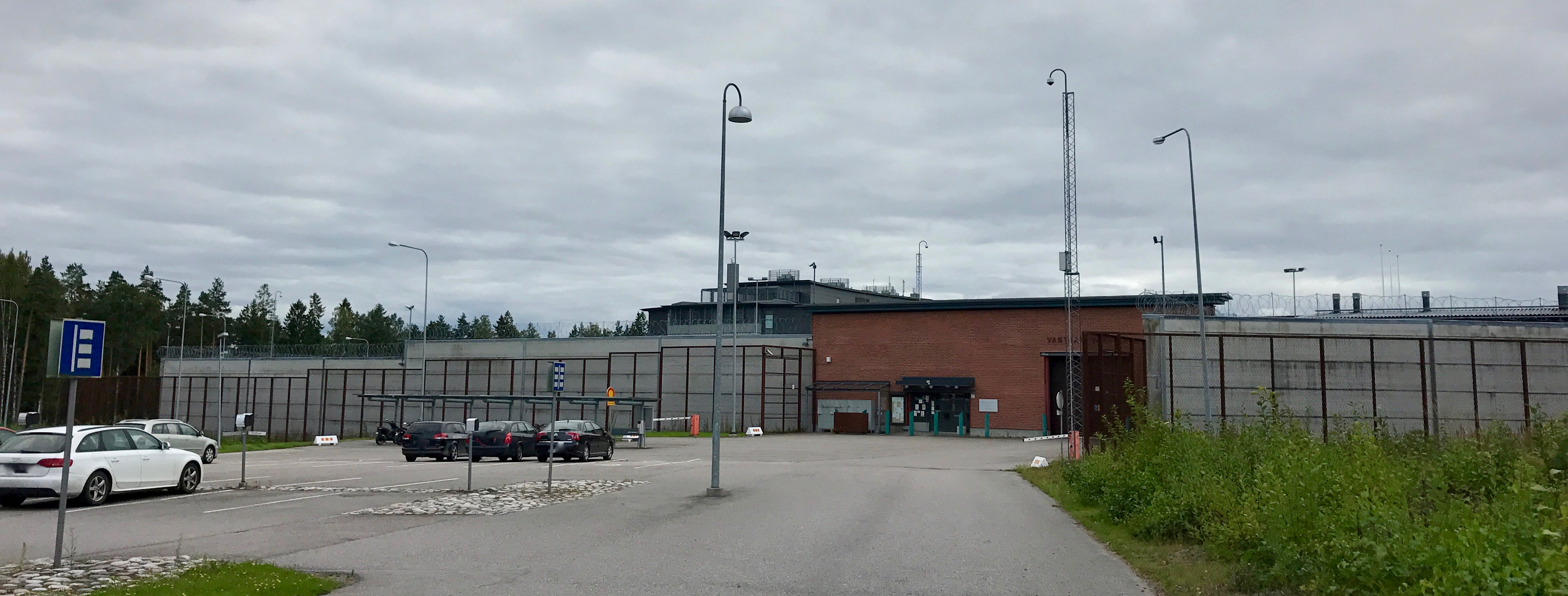 Vantaan vankila, osoitteessa Siltaniitynkuja 2, Vantaa.